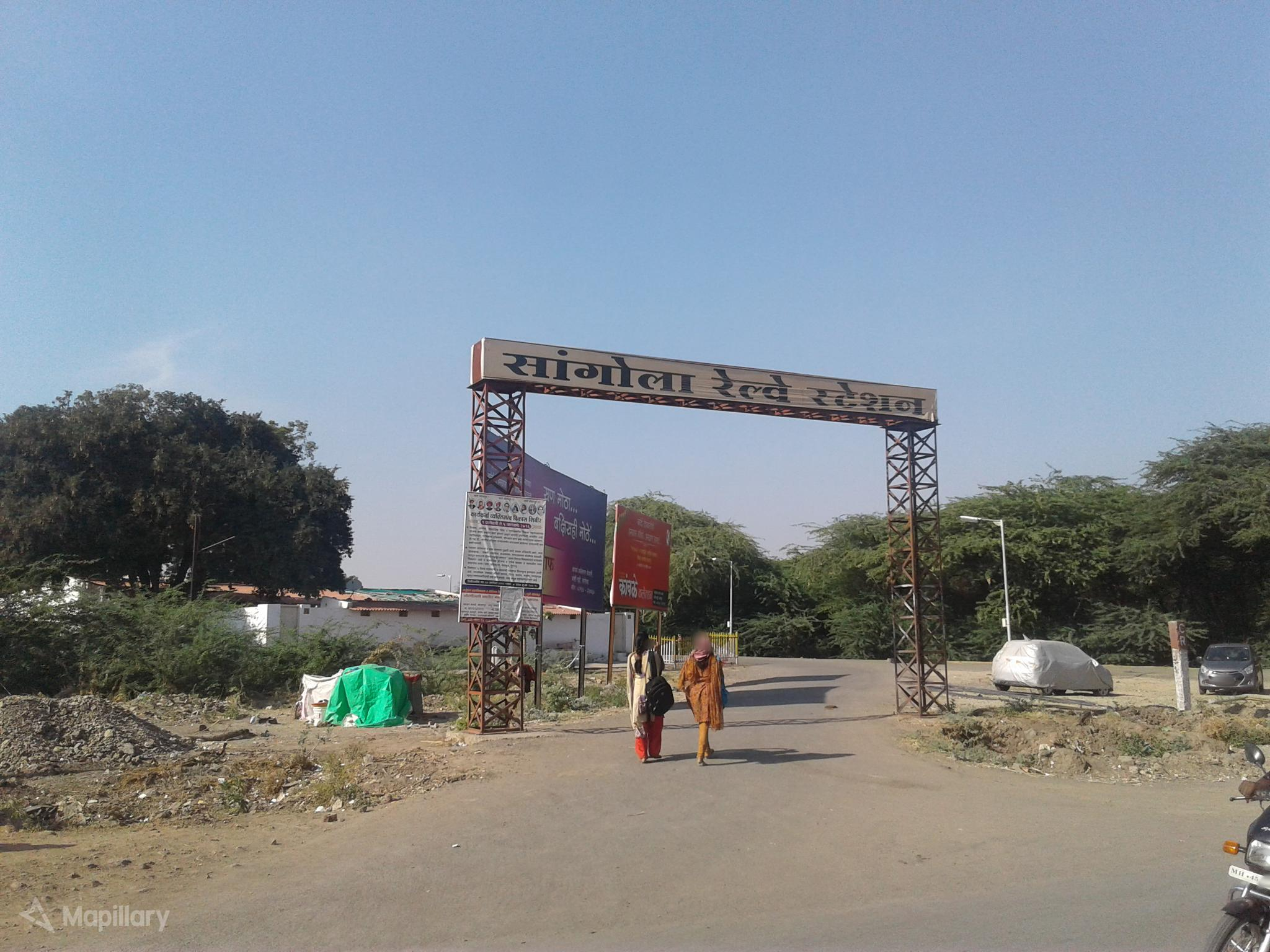 Sangola Railway Station